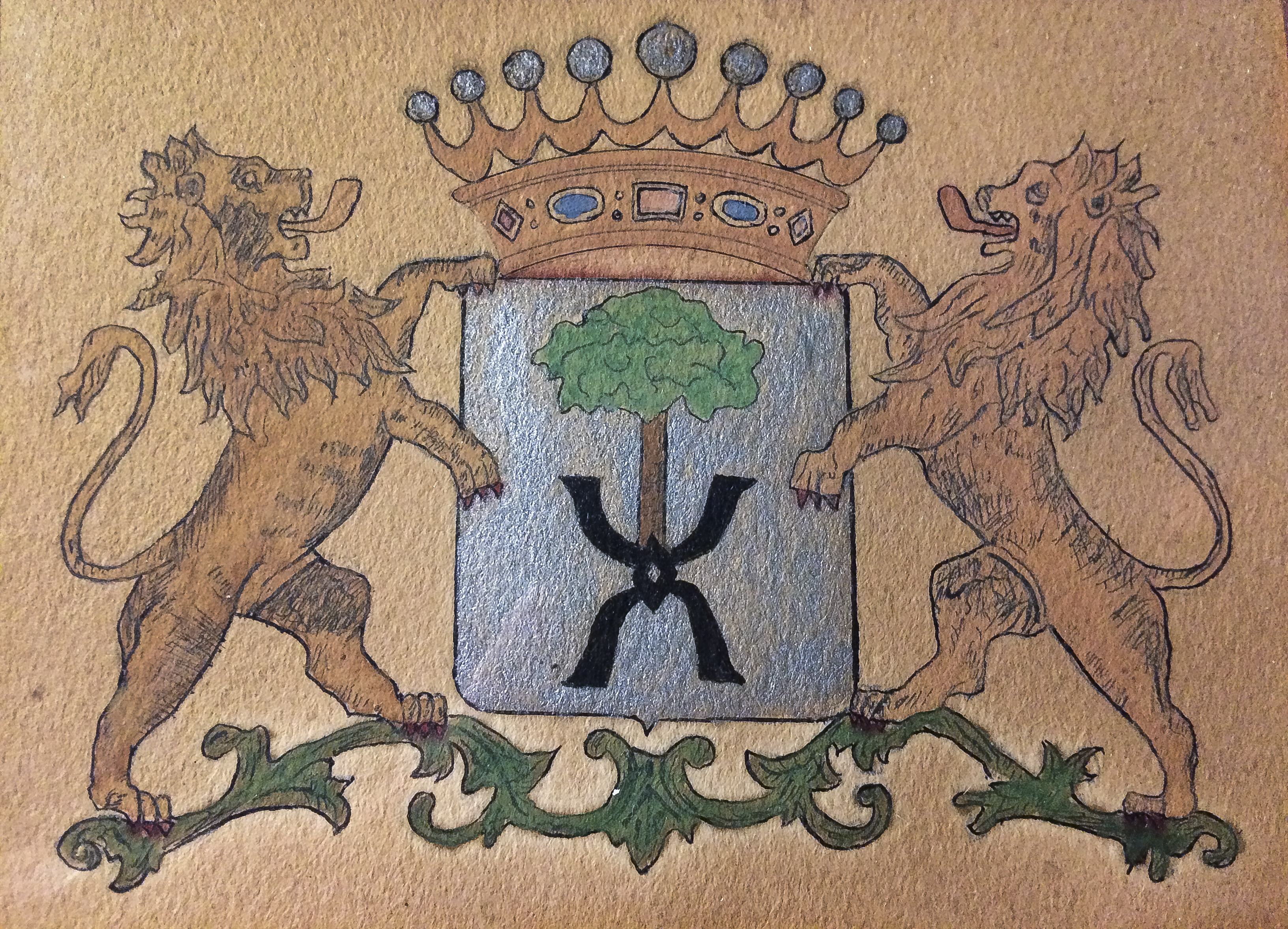 Armes Famille de Longrée